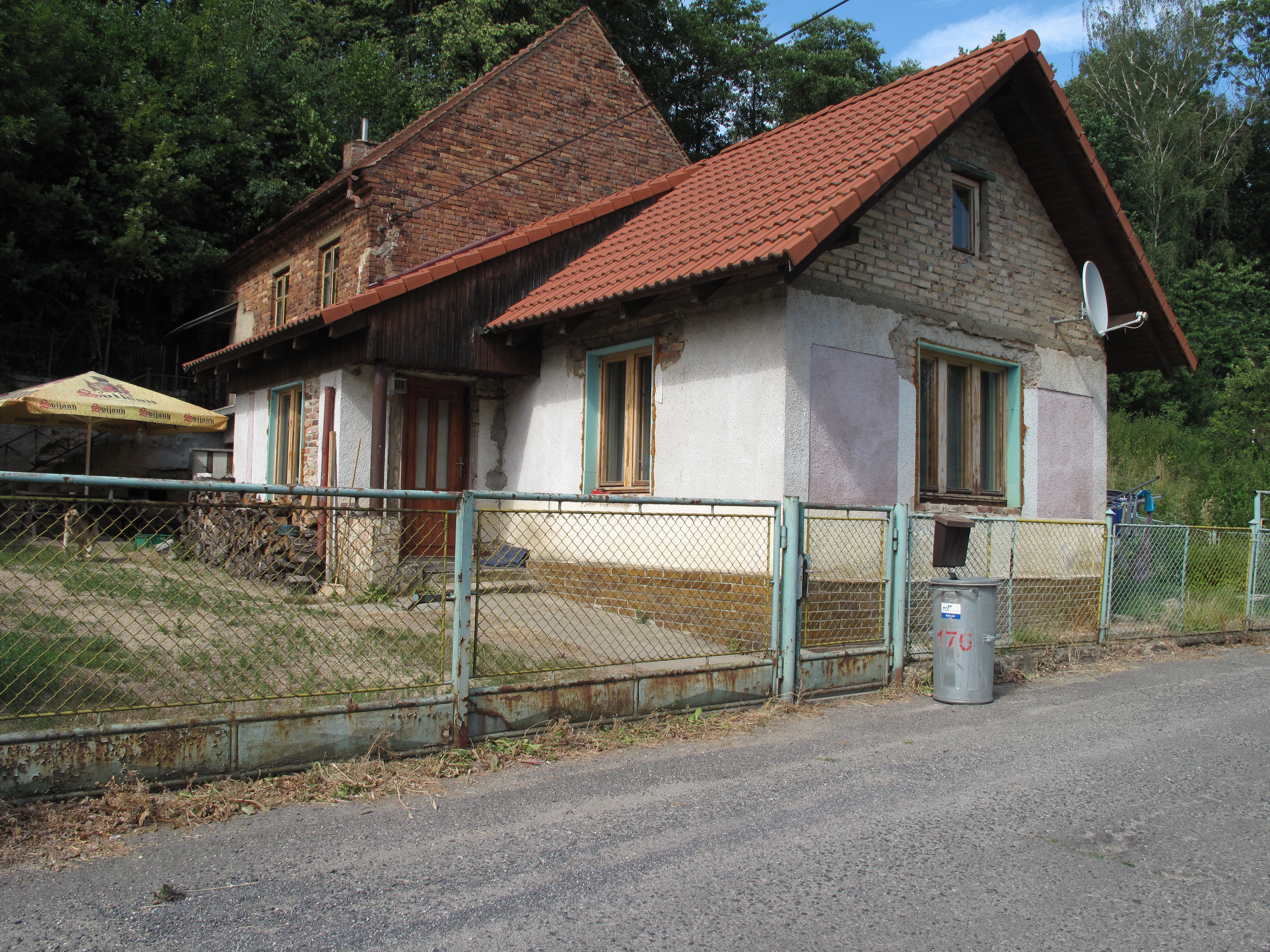 Horní Pertoltice. Česká republika.